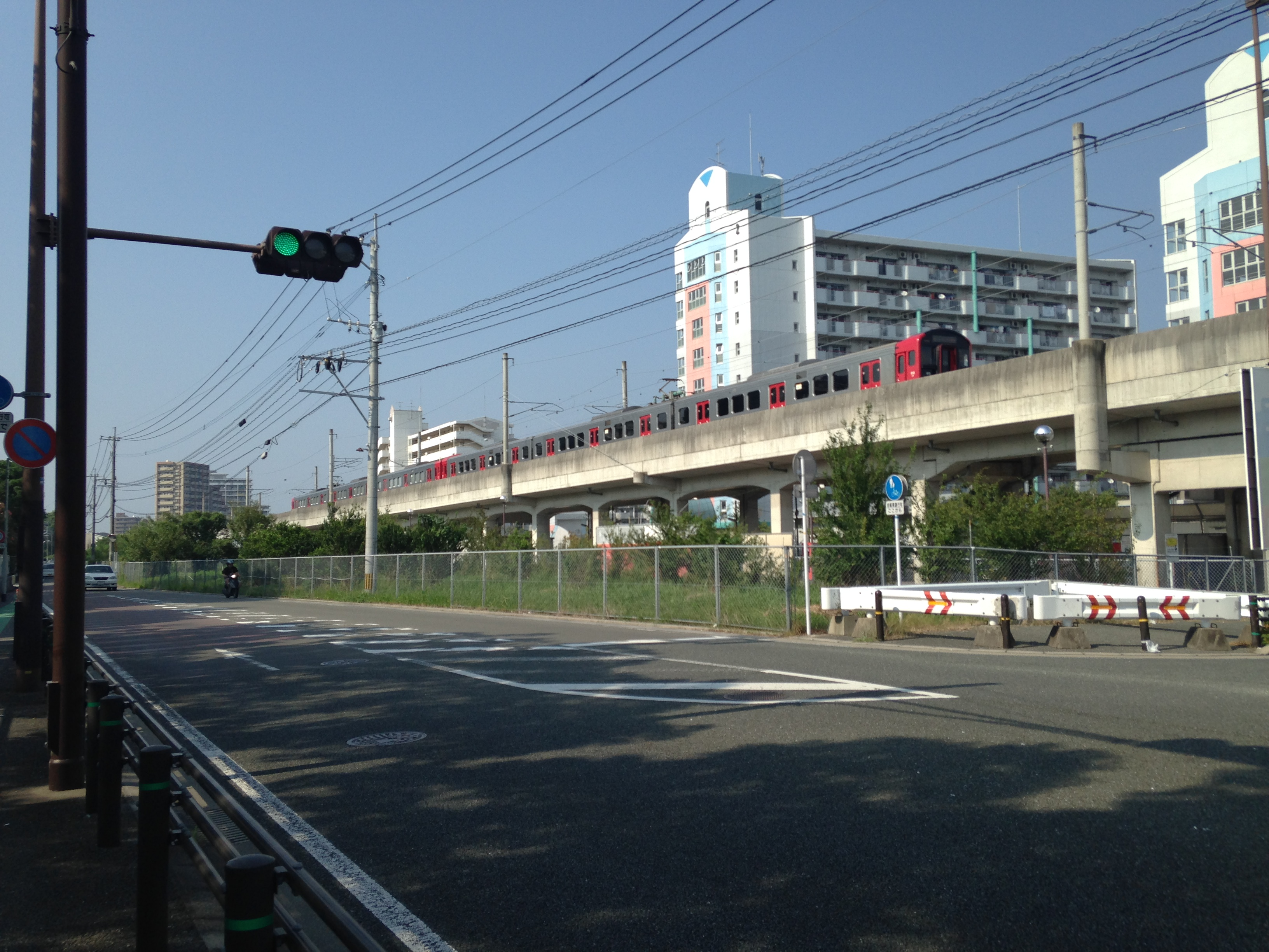 九州大学箱崎キャンパス側を通る鹿児島本線